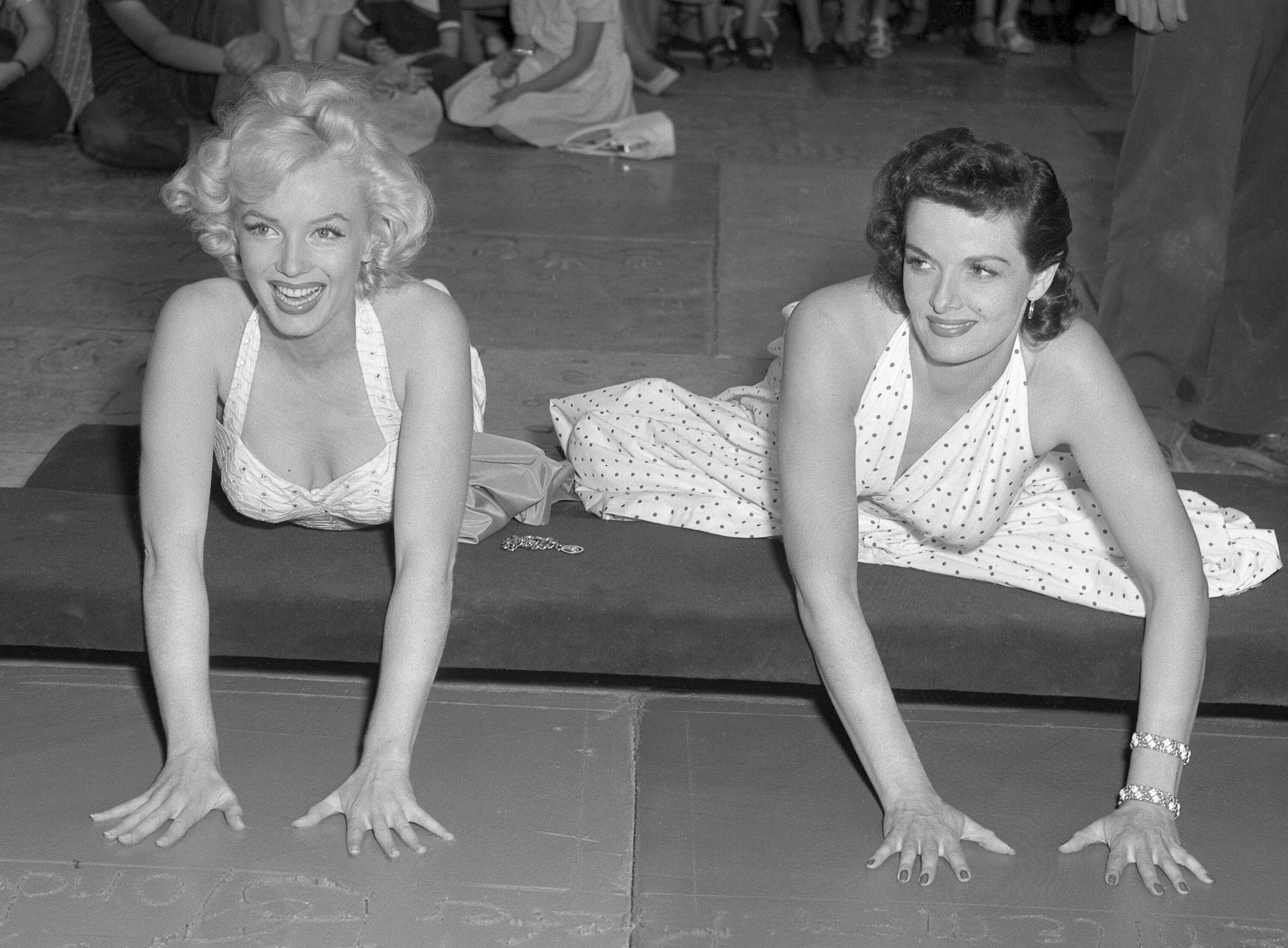 Marilyn Monroe a Jane Russell zanechávají otisky dlaní v betonu před Graumannovým Čínským divadlem v r.1953